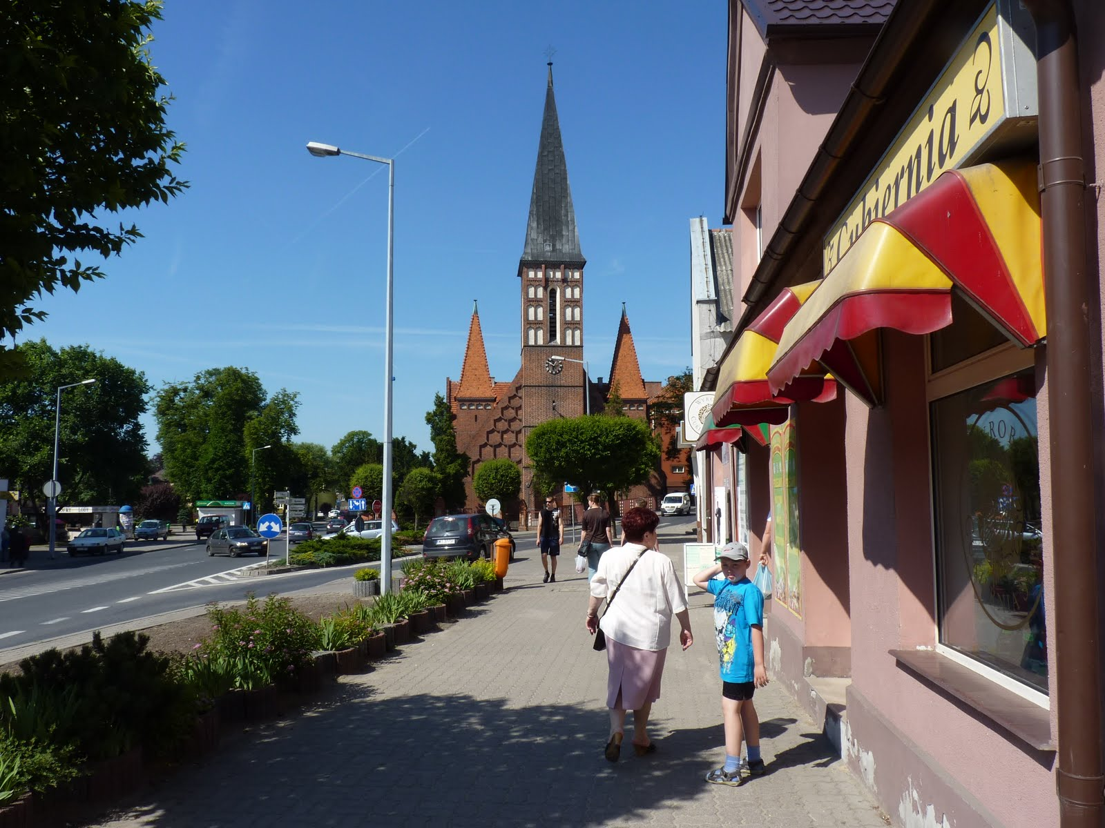 Szubin - Widok kościoła p.w Andrzeja Boboli.